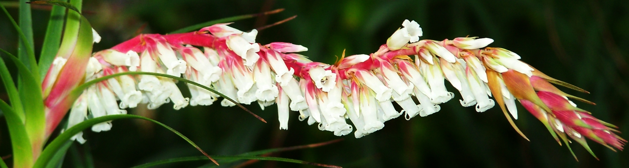 Dracophyllum secundum, Einseitswendiges Drachenbaumblatt, Subfamilia Styphelioideae, SO-Australien, Botanischer Garten Berlin